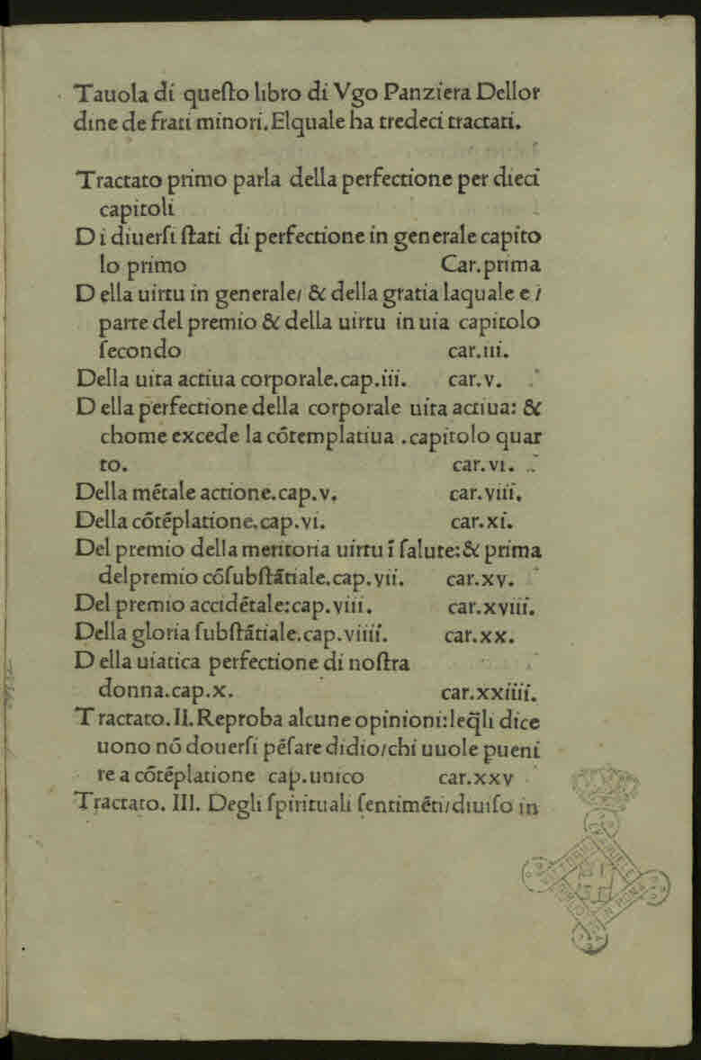 Trattati spirituali. - Impresso in Firenze : per Antonio Mischomini, MCCCCLXXXXII adi VIIII di giugno. - 100 c. ; [*]², a-l⁸, m⁴, n⁶ ; 4°. - Marca tipografica a c. m4v .